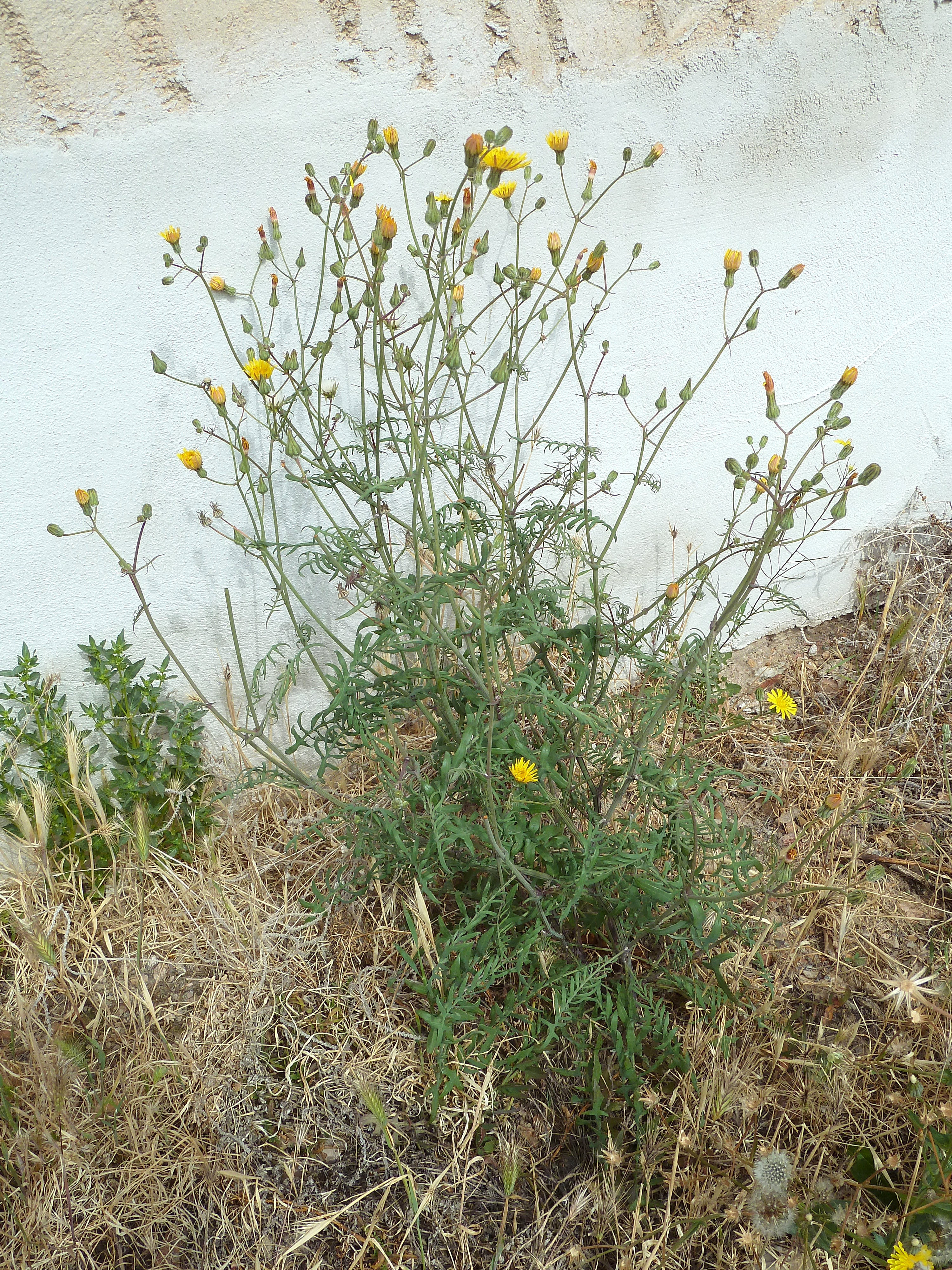 Sonchus tenerrimus - ( cerraja menuda, cerraja tierna,...) - Vista general de un individuo urbano. Solar/descampado calle Compositor Manuel Berná Gracía, Albatera (Provincia de Alicante, España).